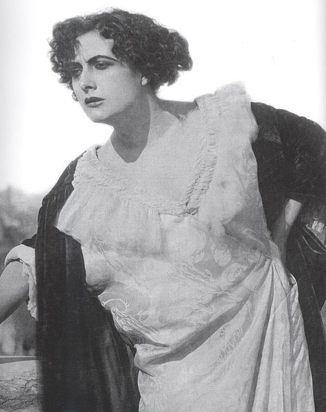 Francesca_bertini,_1915,_assunta_spina fonte:flickr